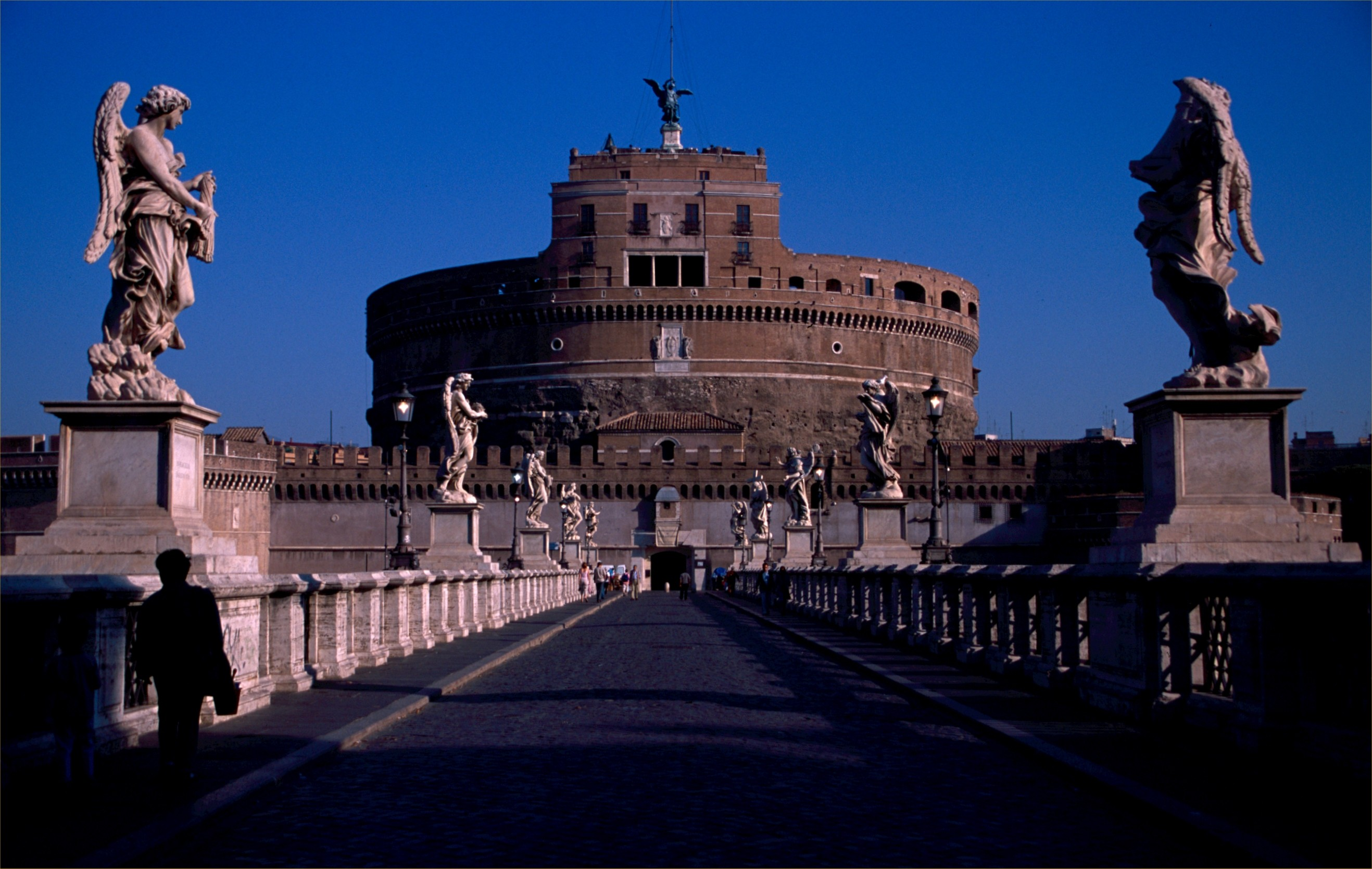 Ponte e Castel Sant'Angelo at dawn.